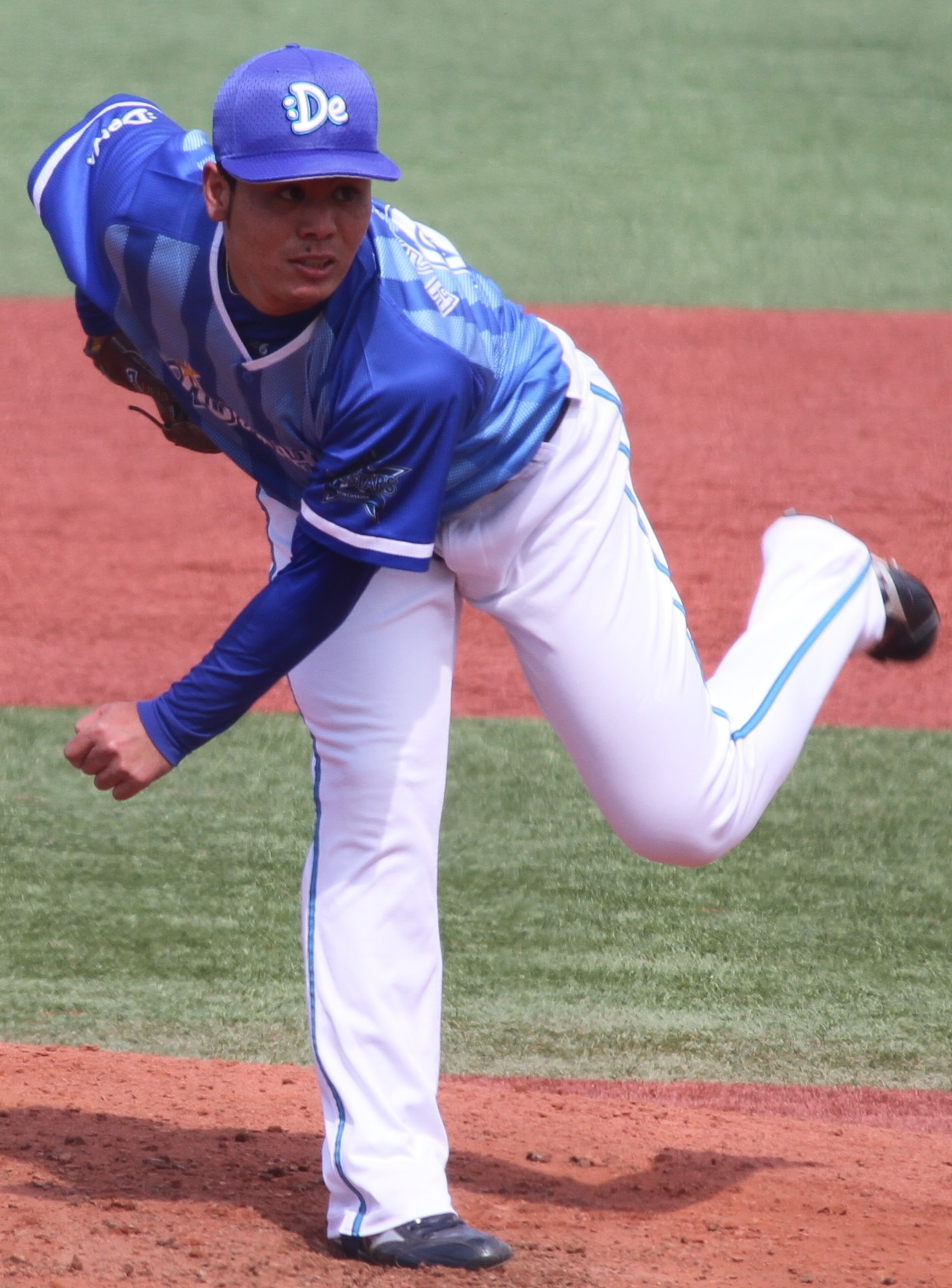 横浜DeNAベイスターズ投手の濵口 遥大。明治神宮野球場にて。